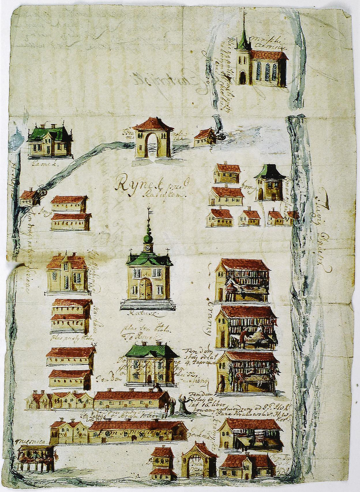 Беларуская (тарашкевіца): Шклоў (Škłoŭ). Плян места